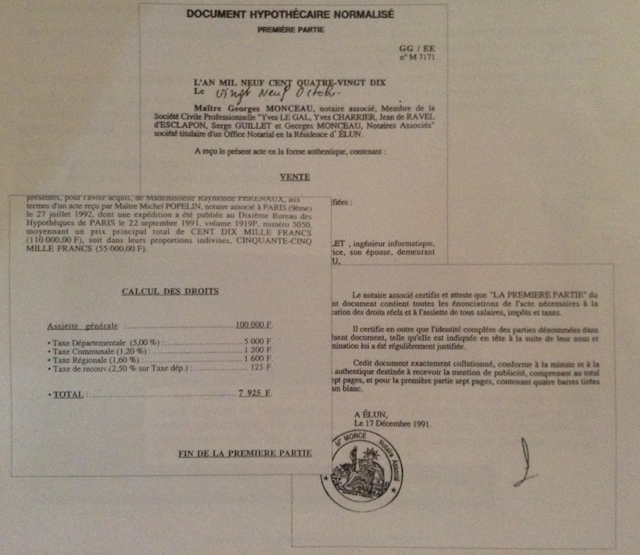 Fac-similé d'un Document Hypothècaire Normalisé